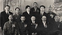 Нурбаев Мамат с Героями Социалистического Труда СССР и другие из Узгенского района